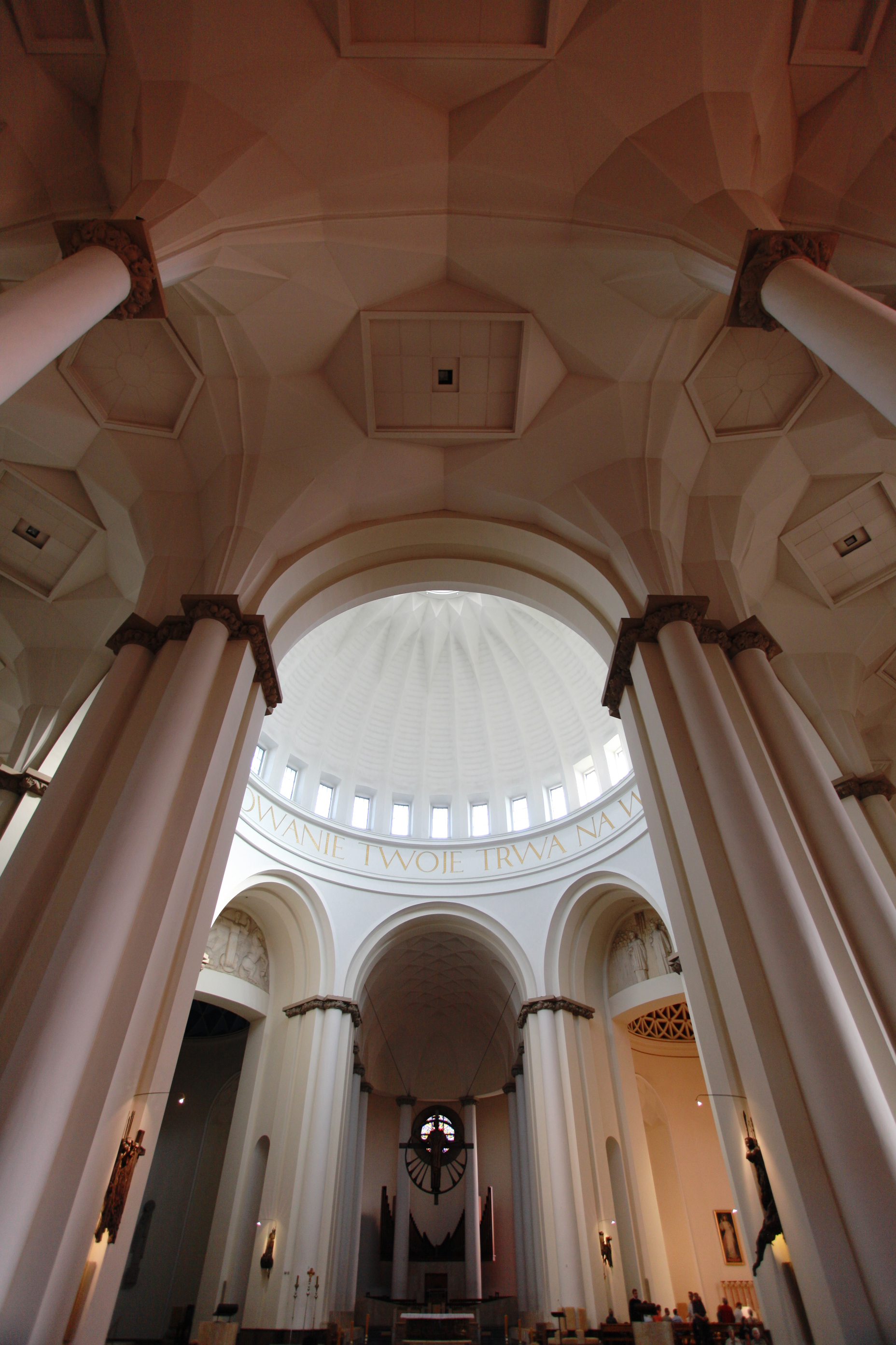 Widok na ołtarz